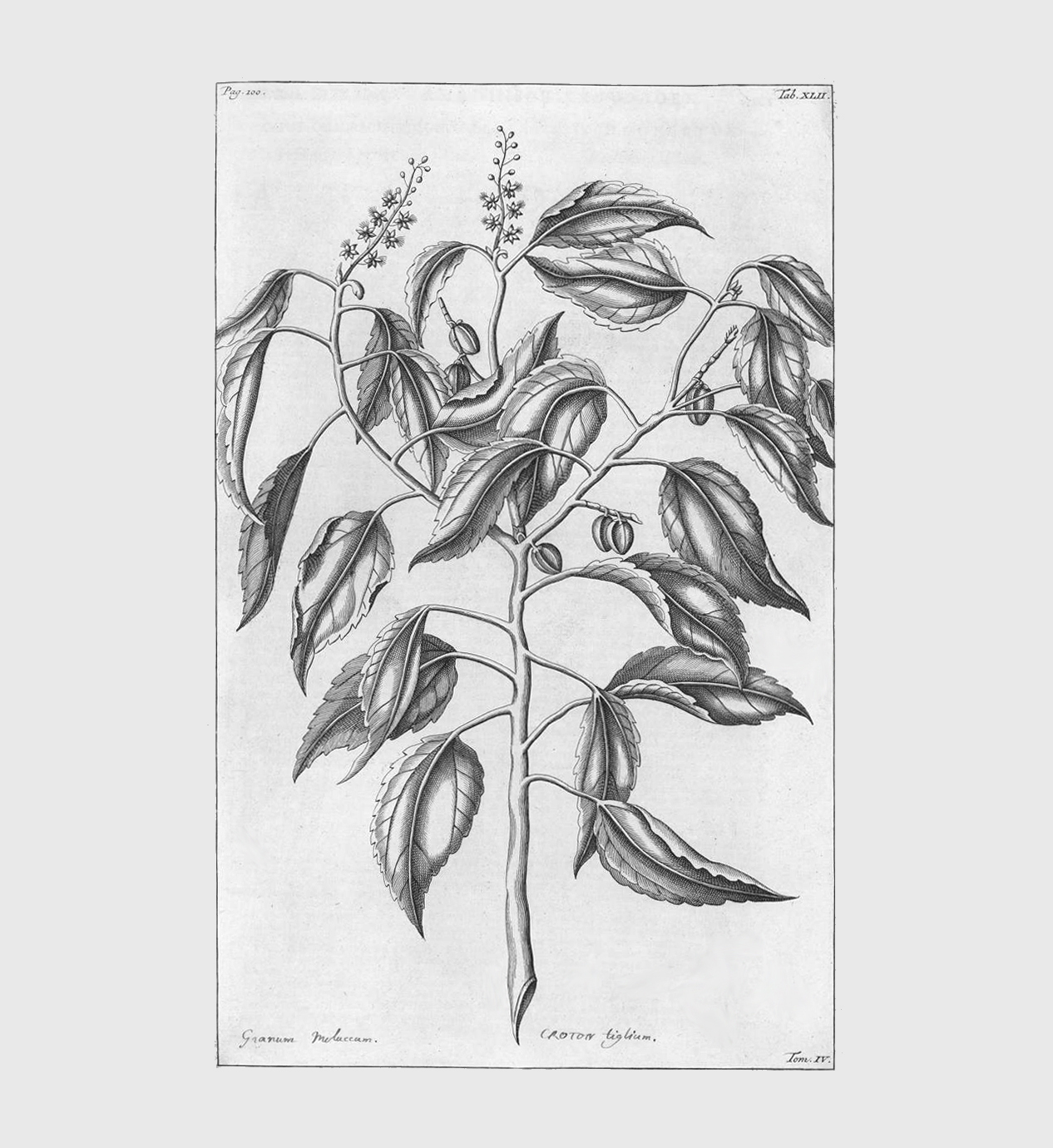 Abbildung von Croton tiglium